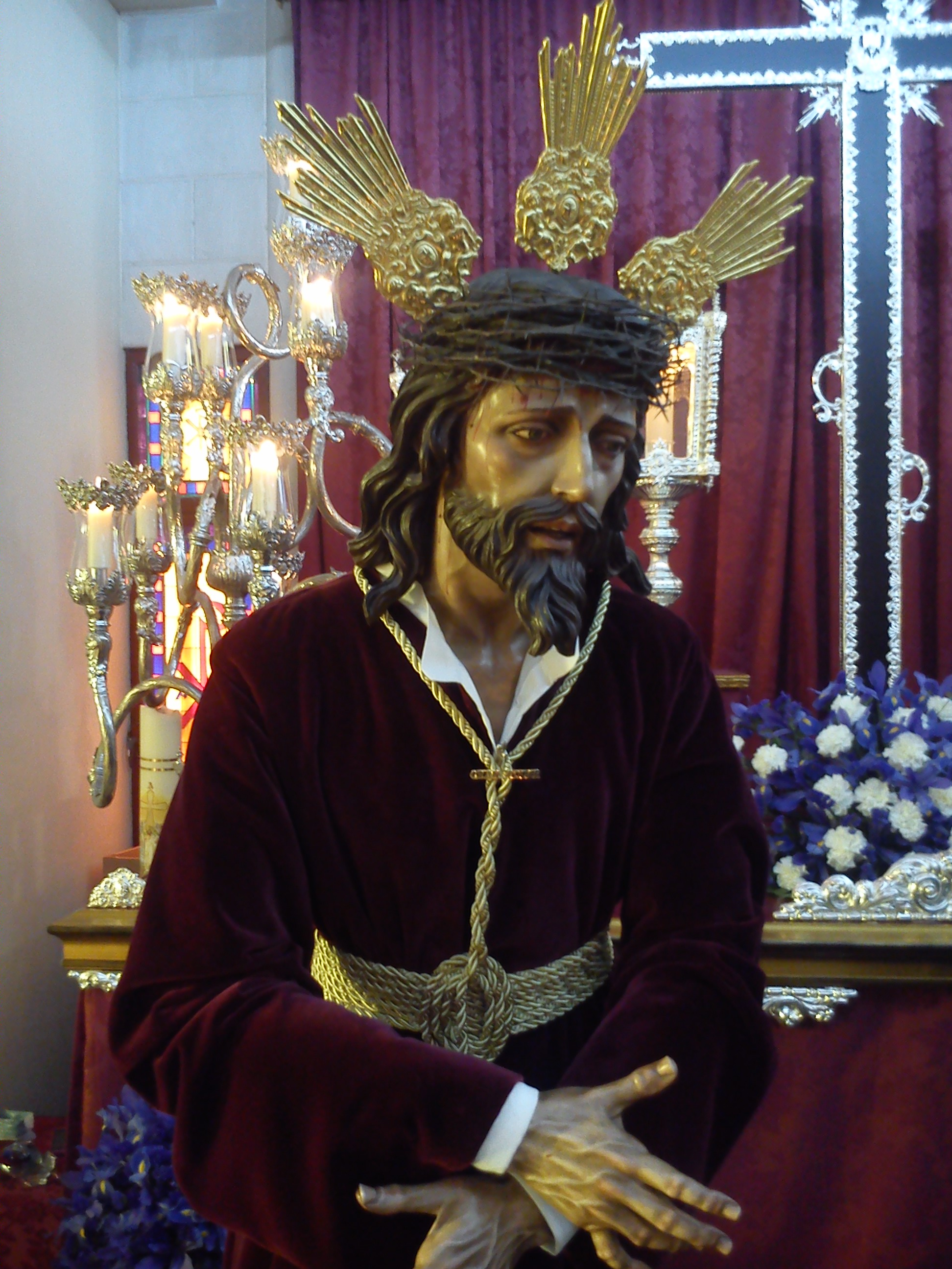 Jesús del Gran Poder de Jaén.